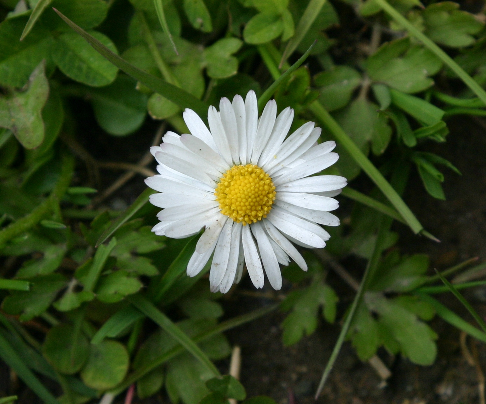 Margréidercher op enger Wiss.